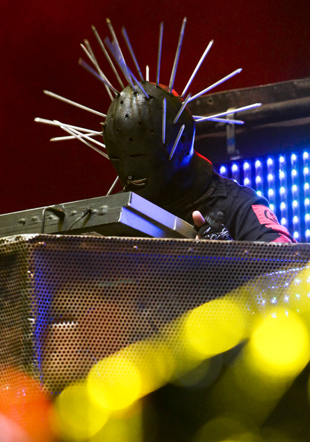 Slipknot ao vivo no Festival Optimus Alive, em Oeiras. JOSÉ SENA GOULÃO